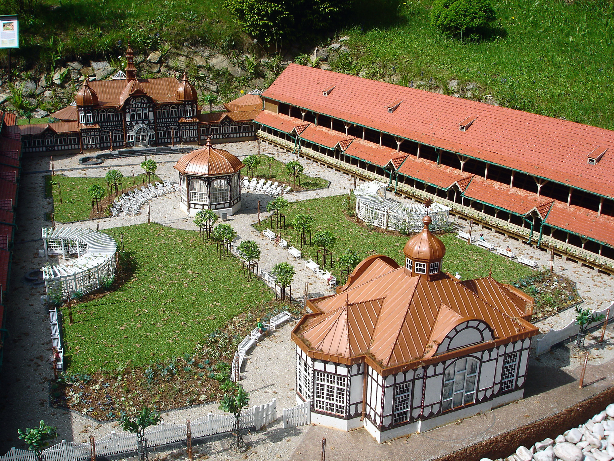 Modell des Bad Salzunger Gradierwerks im mini-a-thür Ruhla